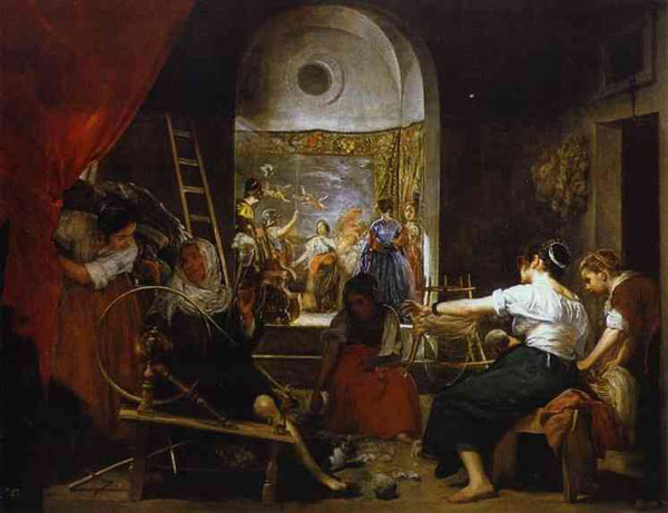 Ukranian